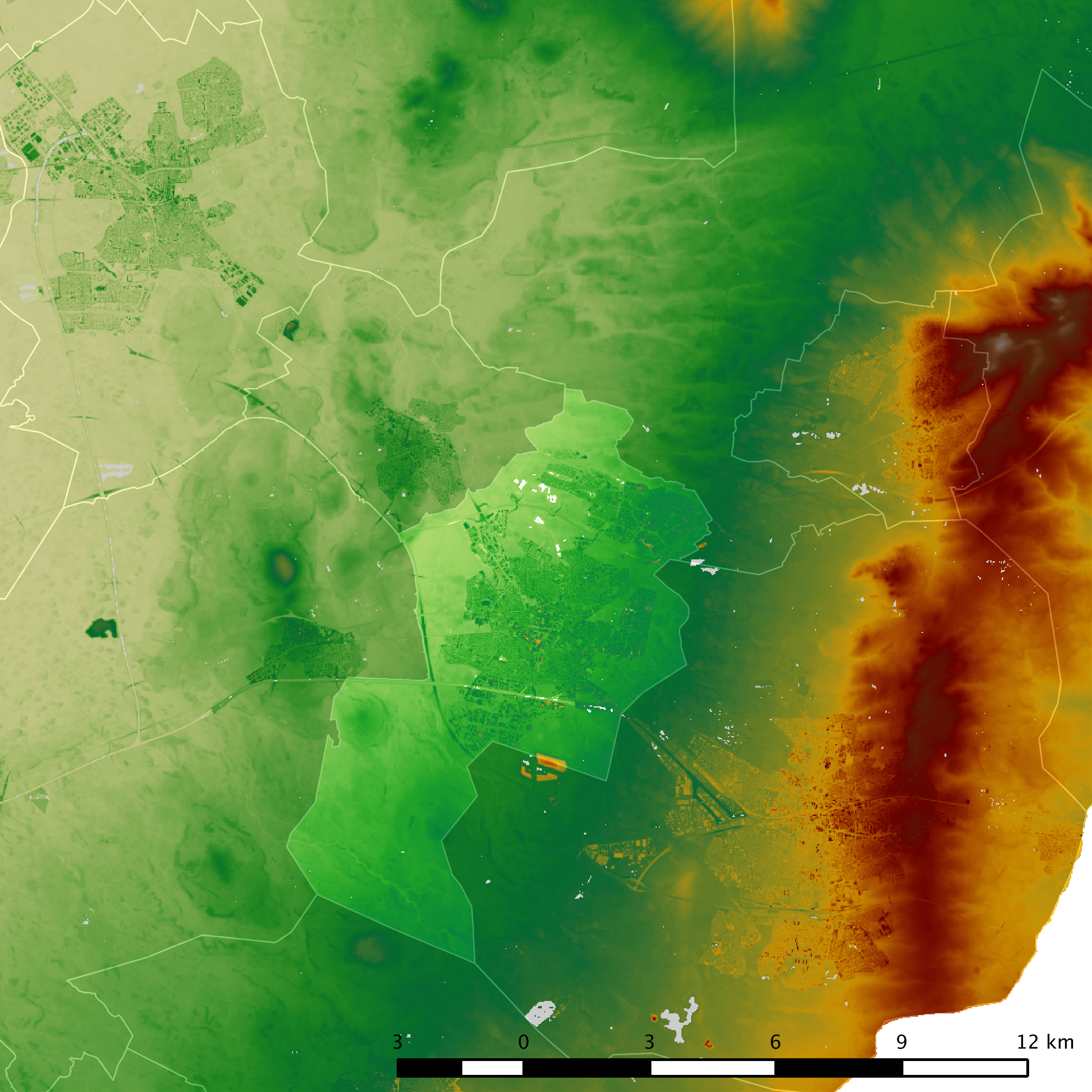 Hoogtekaart van Hengelo en omgeving. Gebaseerd op gegevens uit het Actueel Hoogtebestand Nederland (AHN) ter beschikking gesteld onder de CC-BY-3.0-licentie